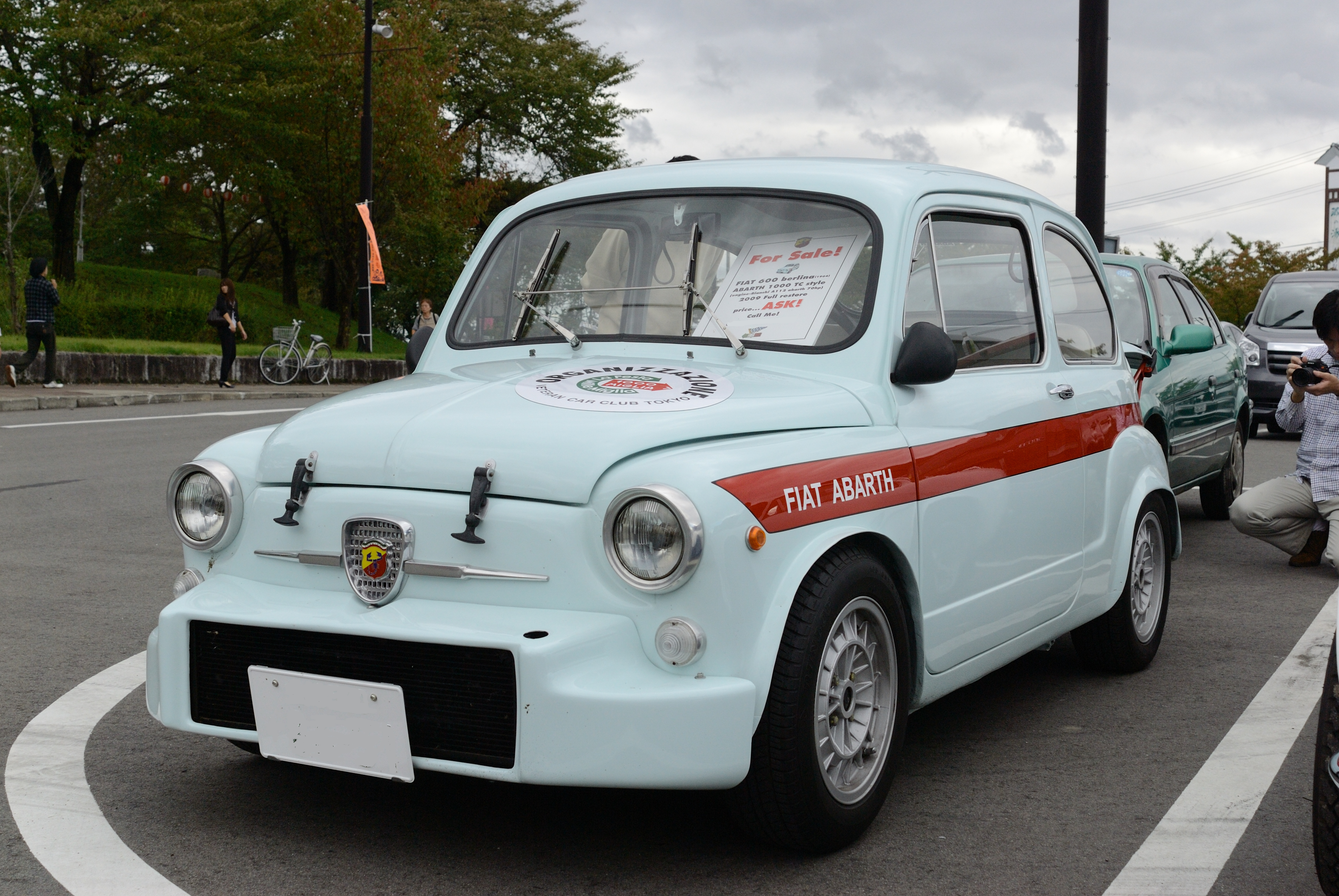 FIAT 600 Berlina (1964) ABARTH 1000 TC Style